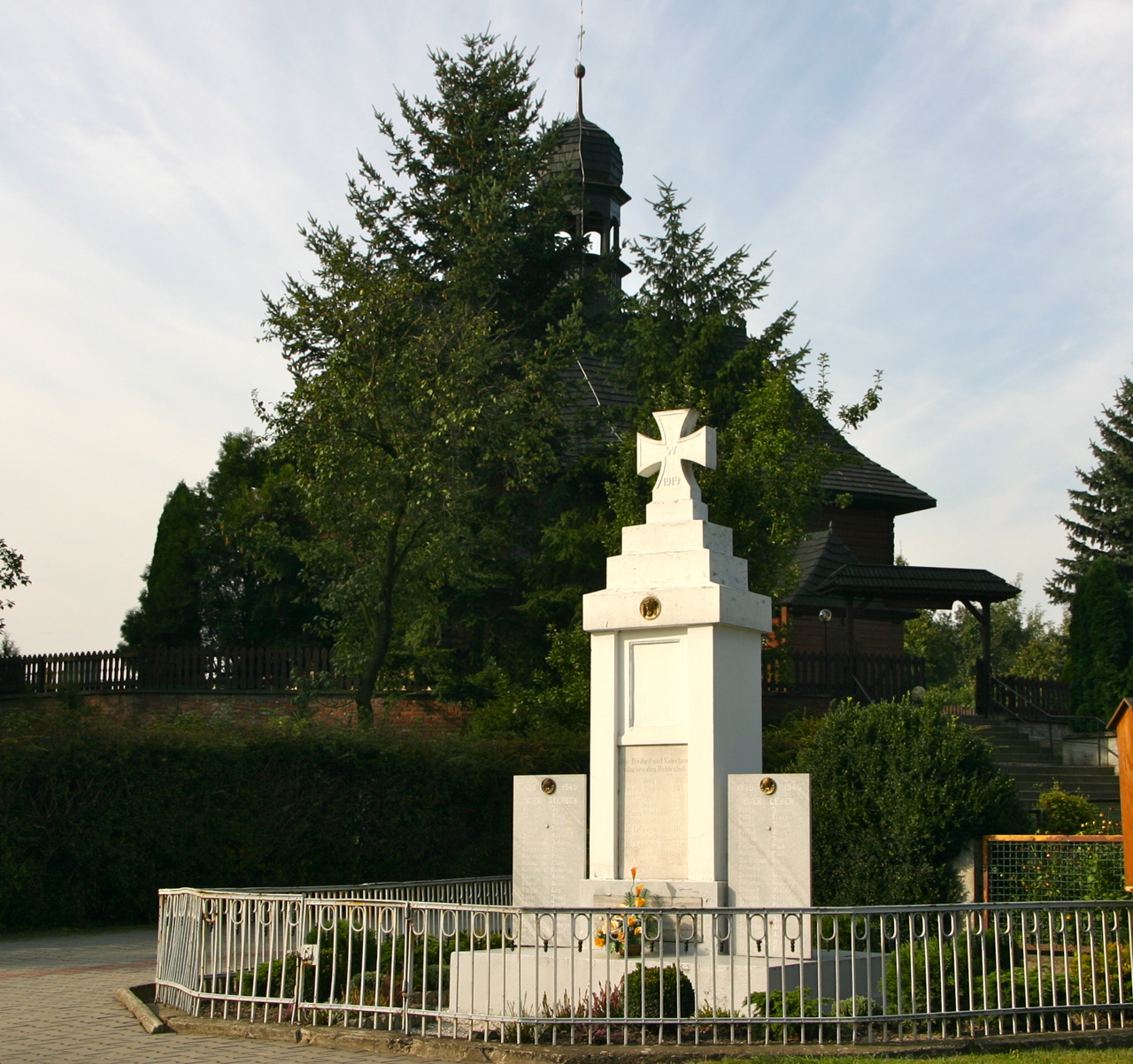 Rzepcze (dodatkowa nazwa w j. niem. Repsch) – wieś w Polsce położona w województwie opolskim, w w powiecie prudnickim, w gminie Głogówek.